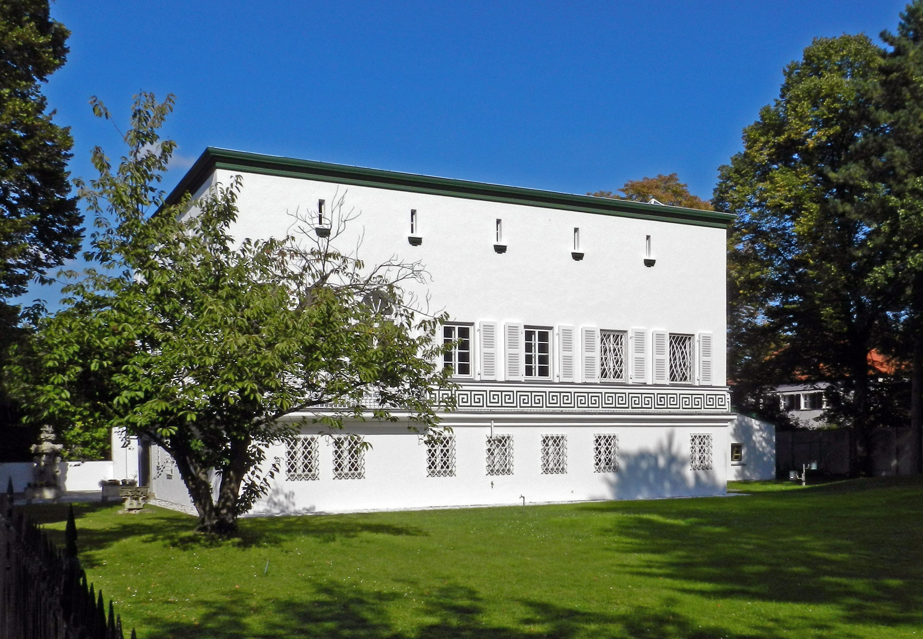 Landhaus, Binger Straße 51/52, Berlin-Wilmersorf. Bauzeit: 1924-25, Architekten: Pauk Mebes, Paul Emmerich, Bauherr: Geheimrat Hans Riese.